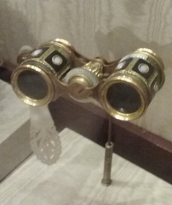 Gemelos de teatro. Bronce, nácar y ópalo. Siglo XIX. Museo del Romanticismo (Madrid). (Objeto cedido por el Museo Nacional de Artes Decorativas)